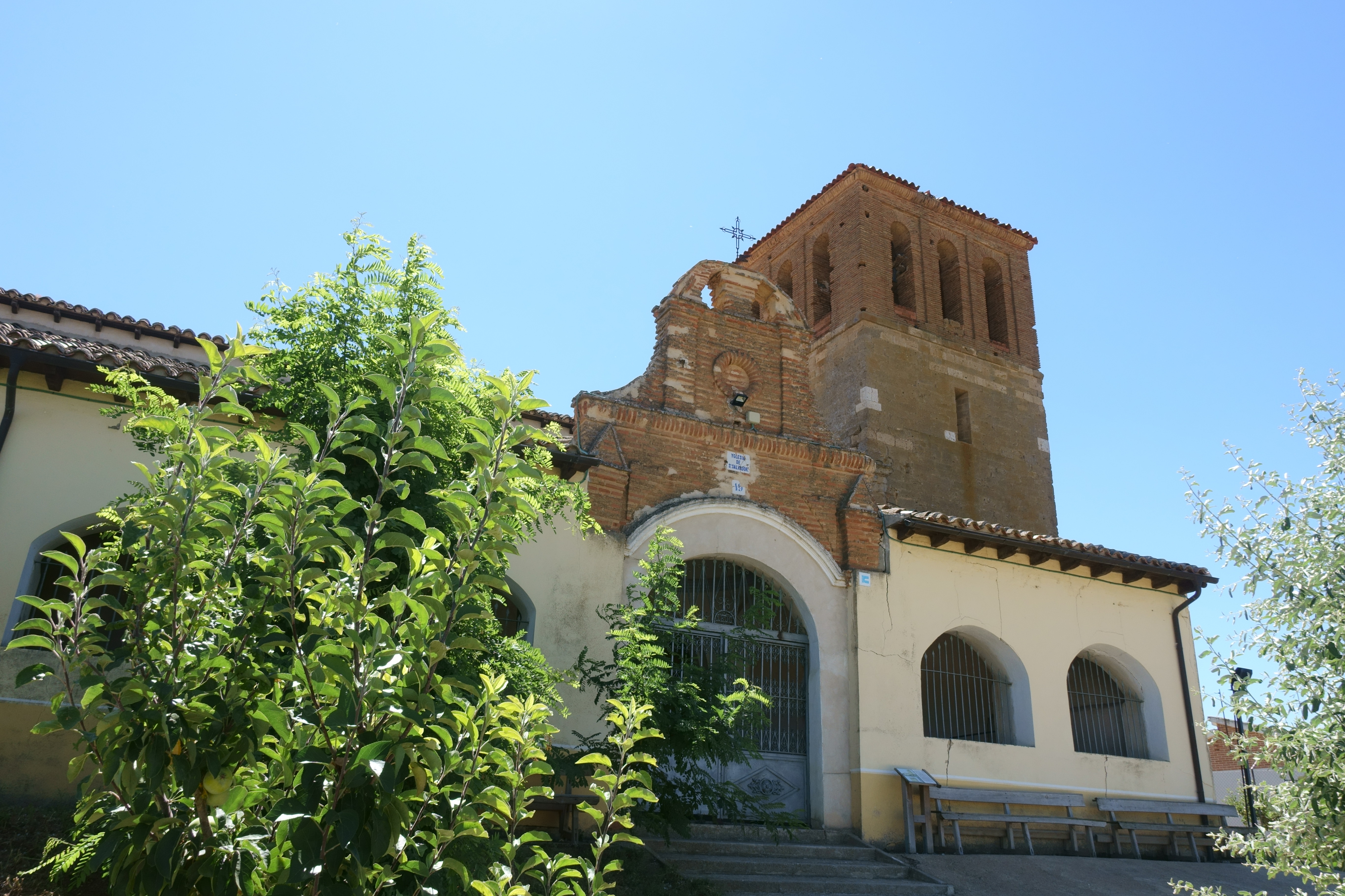 Iglesia del Santísimo Salvador, Vega de Ruiponce (Valladolid, España).